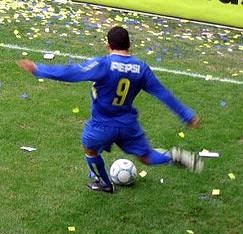 Carlos Tevez jugando para Boca Juniors en el torneo Clausura 2004.